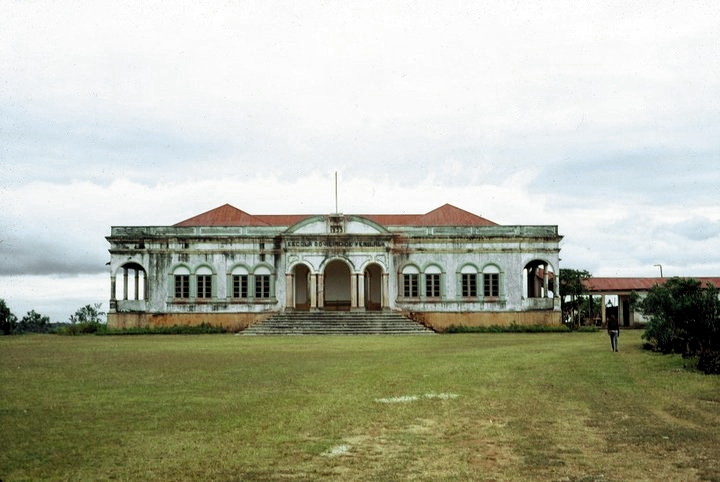 A escola foi obra do Administrador Pinto Correia.Destruída durante a 2ª GG,foi posteriormente reconstruída.Estava a funcionar á data.Recentemente foi restaurada com o patrocínio da Swatch,ficando muito colorida